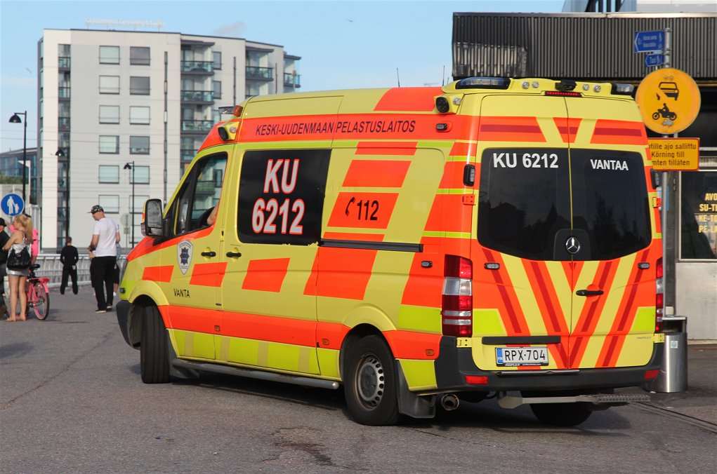 Keski -Uudenmaan pelastuslaitoksen yksikkö KU 6212 päivystämässä Korso Rock Festiva -tapahtuman vieressä Vantaan Korsossa heinäkuussa 2016.